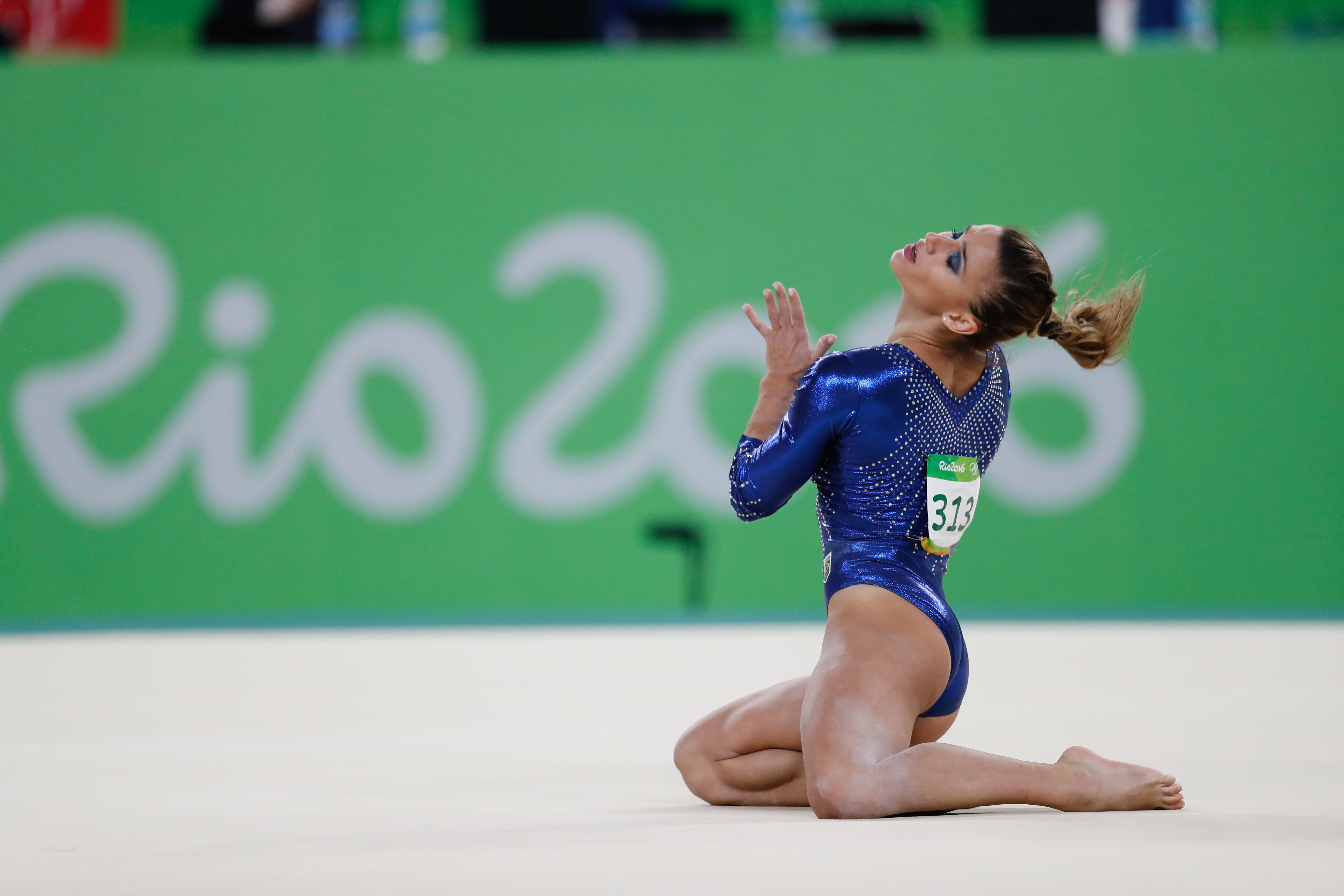 Rio de Janeiro - Jade Barbosa durante final por equipes da ginástica artística feminina nos Jogos Olímpicos Rio 2016, em que o Brasil terminou em 8º lugar. (Fernando Frazão/Agência Brasil)